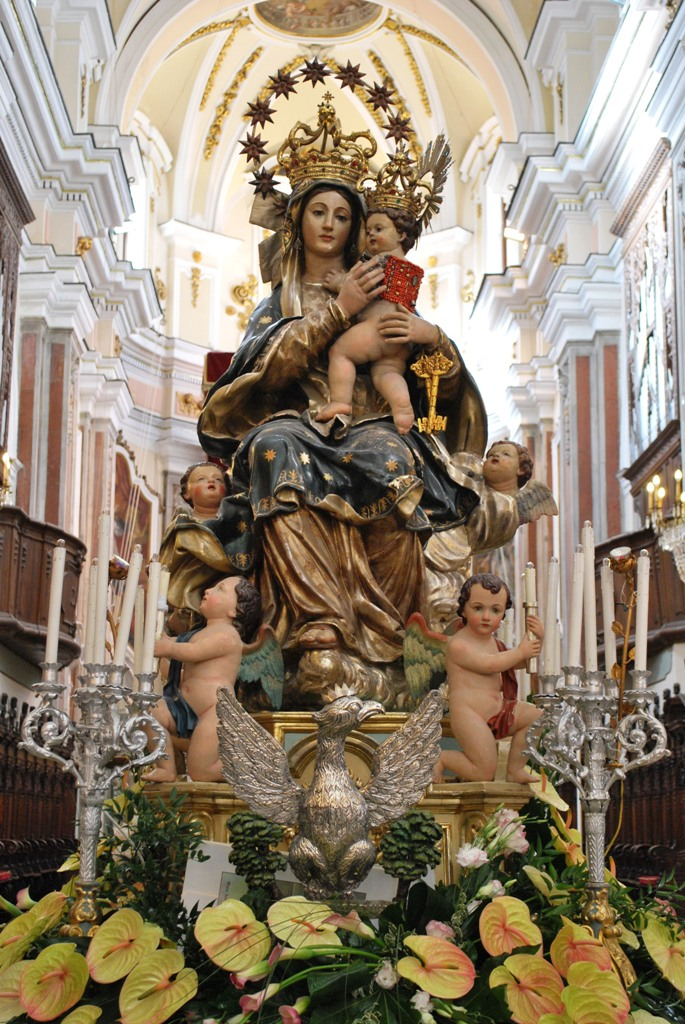 Preparazione per la processione di Maria Santissima dei Miracoli ad Alcamo (2010)